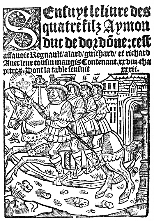 Les quatre fils Aymon sur le cheval Bayard, dans Les Quatre fils Aymon, Paris, A. Lotrian et D. Janot, milieu du XVIe siècle.